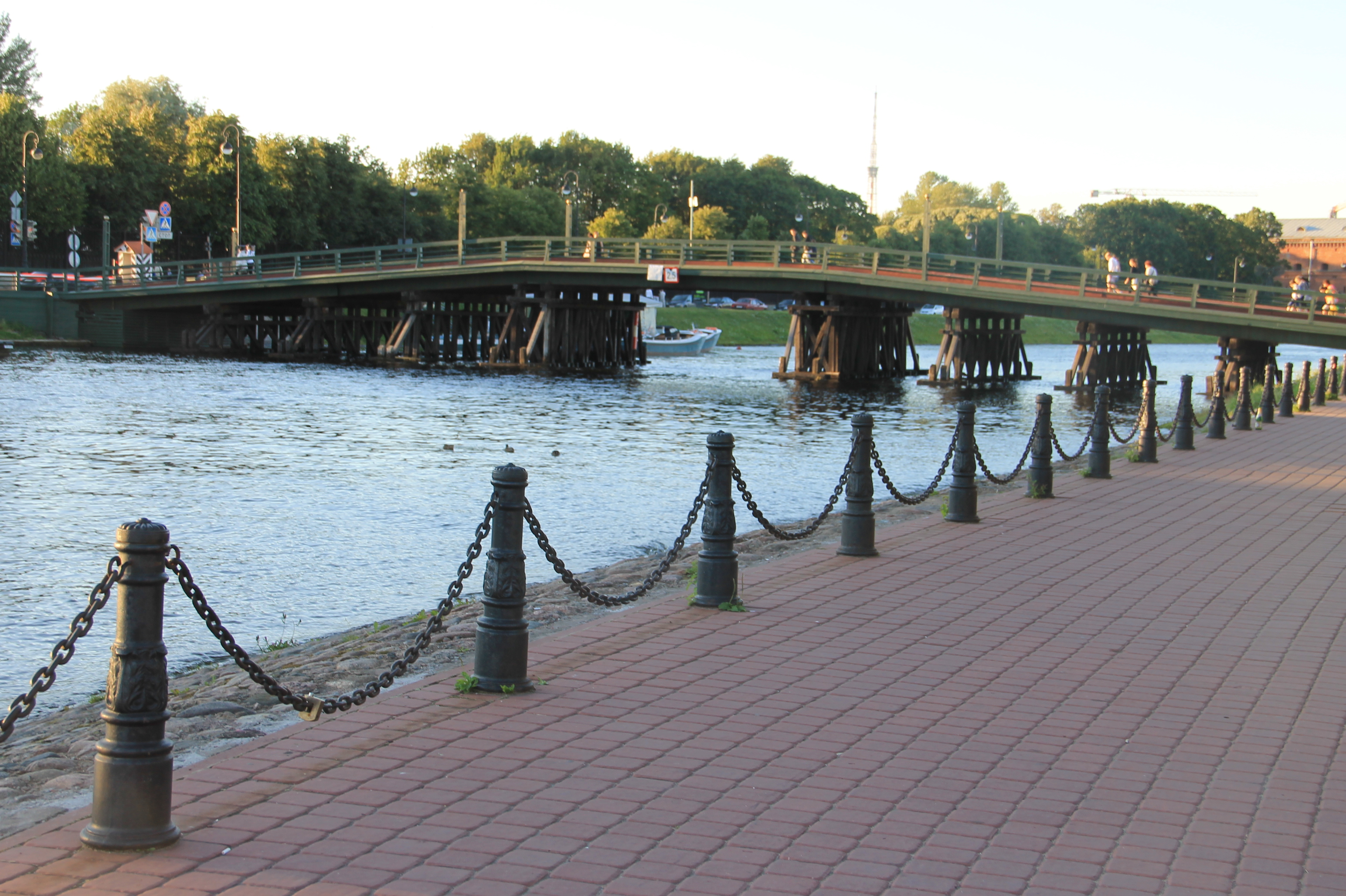 Кронверкский мост через Кронверкский пролив, Санкт-Петербург.